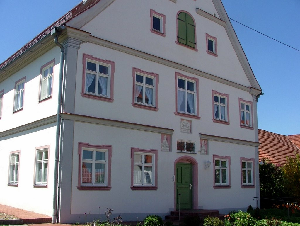 Frechenrieden Pfarrhaus